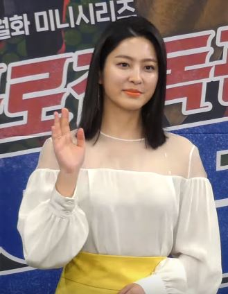 8일 오후 서울시 마포구 상암동 MBC 골든마우스홀에서 MBC 새 월화드라마 '특별감독관 조장품' 제작발표회가 열려 배우 김동욱X류덕환X박세영X설인아X김경남이 포토타임을 갖고 있다.